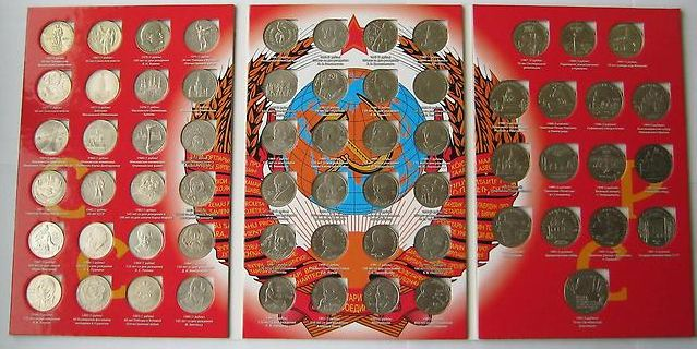 Радянські ювілейні монети в альбомі-планшеті